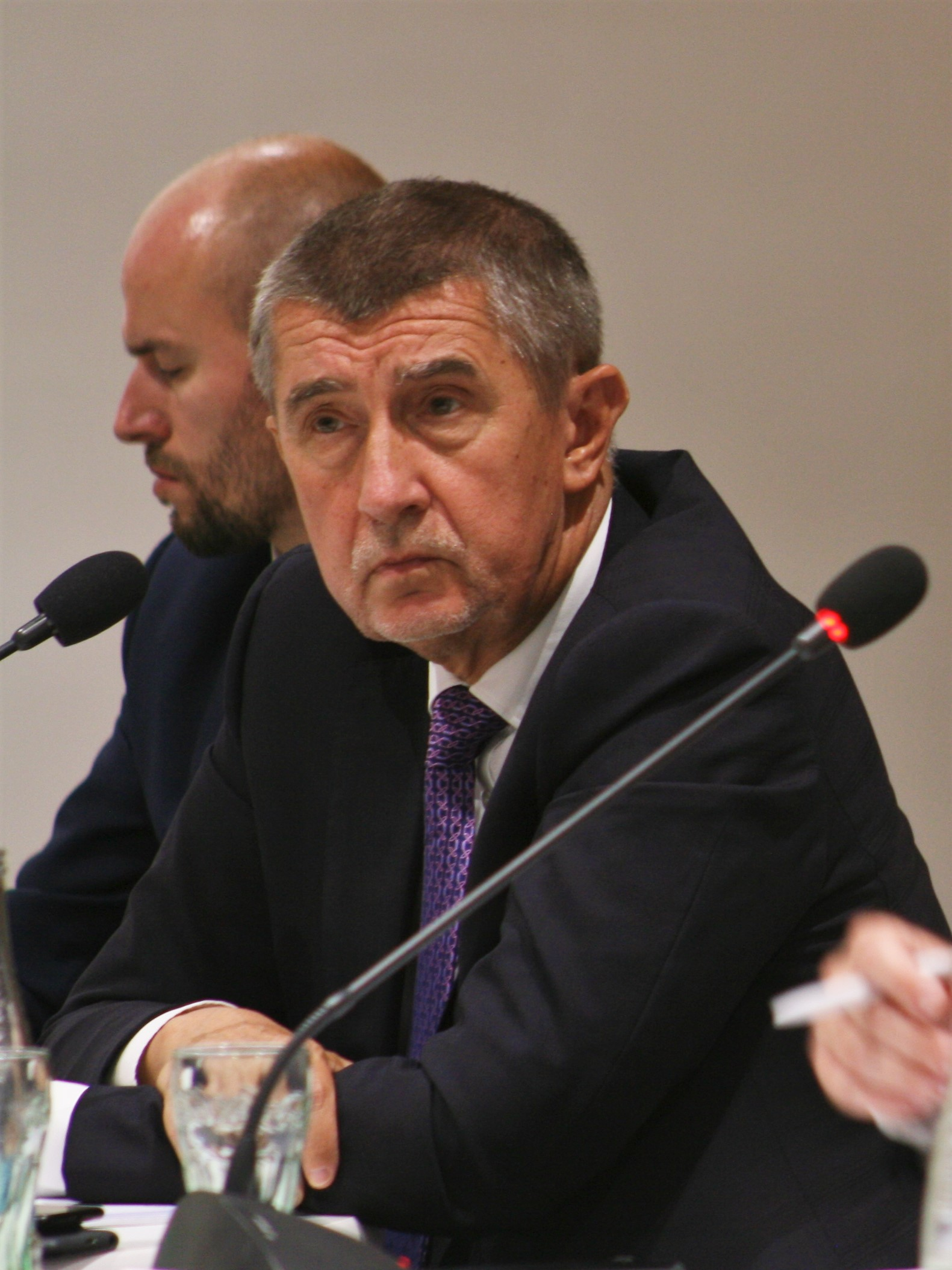 Občanské konzultace Národního konventu - debata "Jakou Evropskou unii chceme?" v sále Morava pavilonu A brněnského výstaviště v sobotu 26. května 2018 od 15 hodin (SELČ) u příležitosti zahájení festivalu Re:publika. Účast: slovenský premiér Peter Pellegrini, český premiér v demisi Andrej Babiš, primátor Brna Petr Vokřál, ředitel Jihomoravského inovačního centra Petr Chládek. Moderátor: profesor Mendelovy univerzity Lubor Lacina.([1], [2], [3])